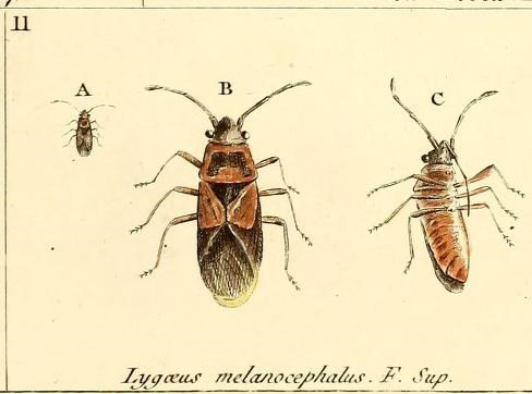 TAB IX. F^-.l. B Te/ti^oma 8-^u/fy/ix . ^ . Suppl. D Cerco/.ij' /a^r^a/cj'. J^. Sup . Tel^onca co,s-67lis. ^. Su/.. f/ Curac/a. spuwj^a.T'. Su/? . A C J Cimea; ^^/Zz i'o -Hn ea/as. T.Sttp. 7 B Cinie^v J2 -punc&i&/^. T". Si^ • £.y -^ J^e/n6raci\f^ascia/a.T. Sie/7. B Cimej: .An&lope . T". St^. 10 ?i- n Jyyyceus me/a/ioce/./iaiit,f . JH^. Sup. 12 ■1h, . Tt/i/a^us t/uoi/r^i/us. J'. Sur A/i!iein.r\- ,\cu//-.